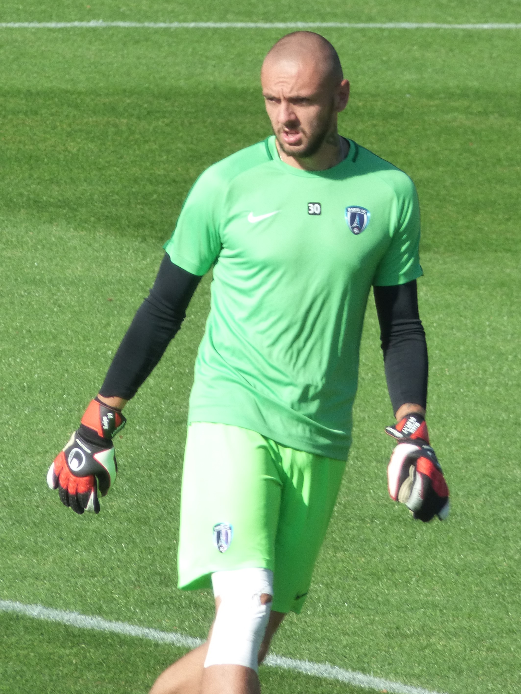 Anthony Maisonnial lors du match amical RC Lens / Paris FC, le 5 août 2020, au Stade Paul-Guerre de Billy-Montigny.